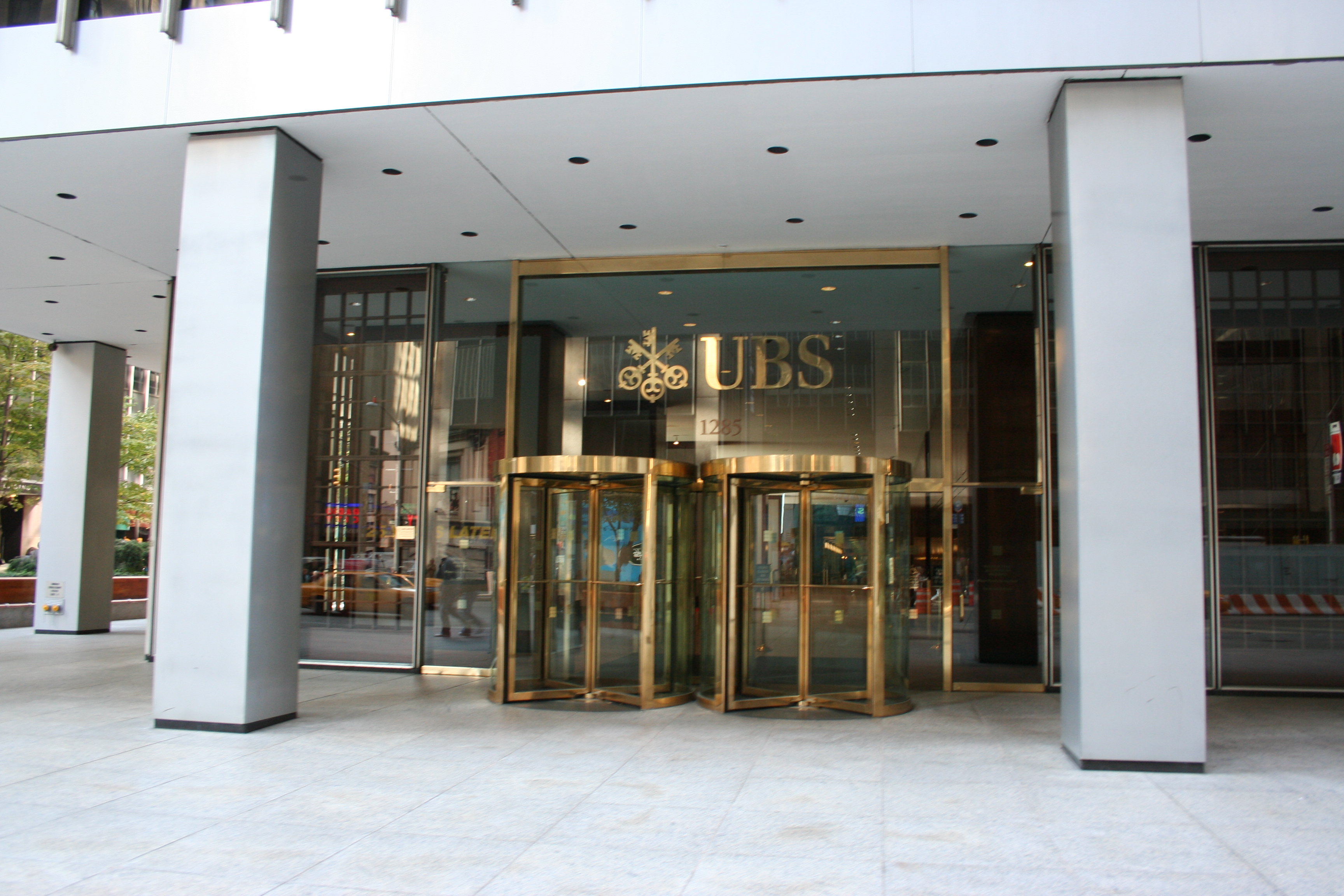 Estrada de um prédio enorme da UBS (que é a empresa para a qual eu trabalho aqui) na 6th av se não estou enganado.